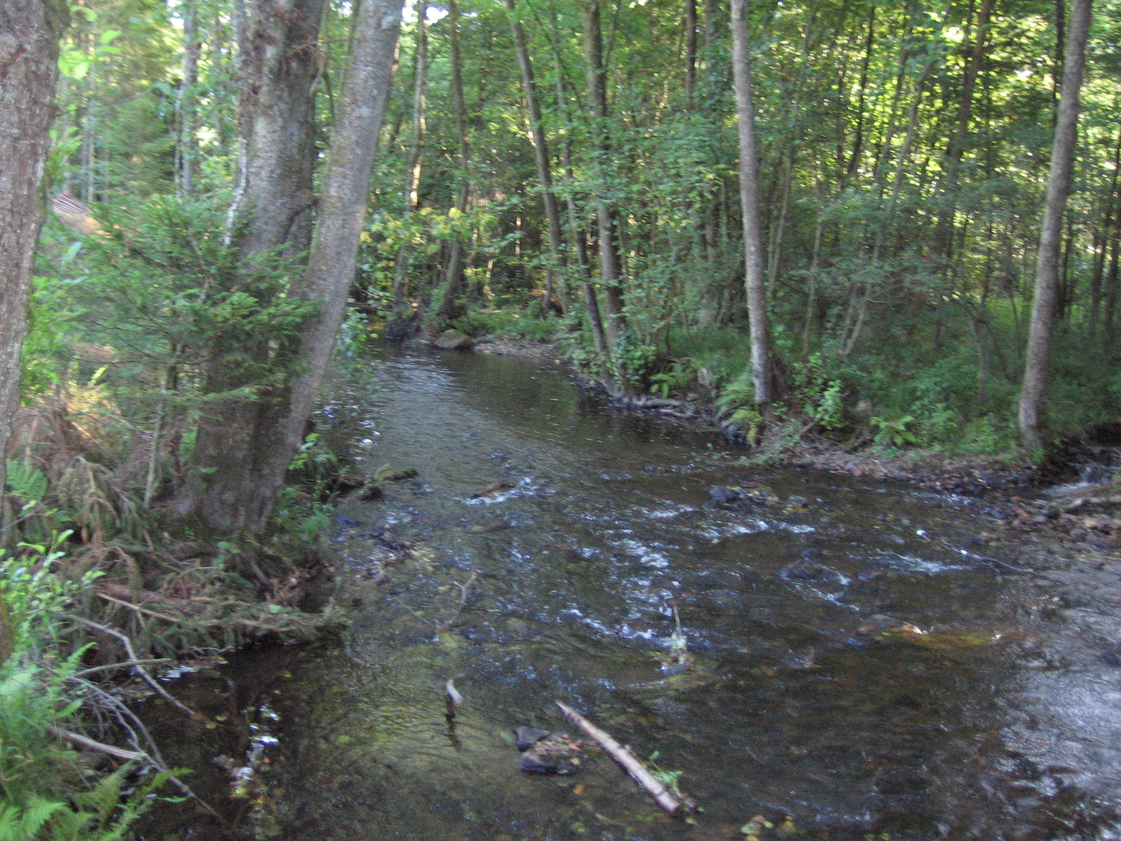 la Hulle trace la frontière entre la France et la Belgique (département des Ardennes, en France, et province de Namur, en Belgique)